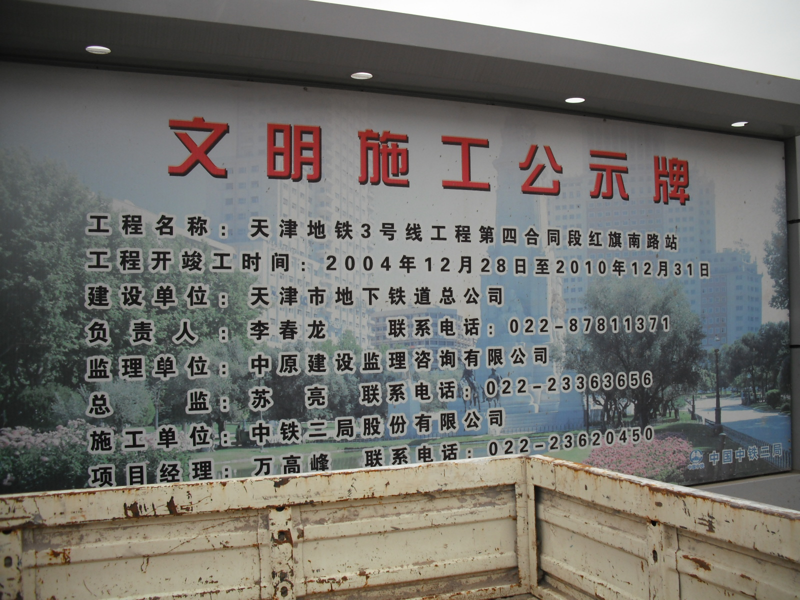 中文（中国大陆）: 天津地铁3号线王顶堤站外的红旗南路站文明施工公示牌。